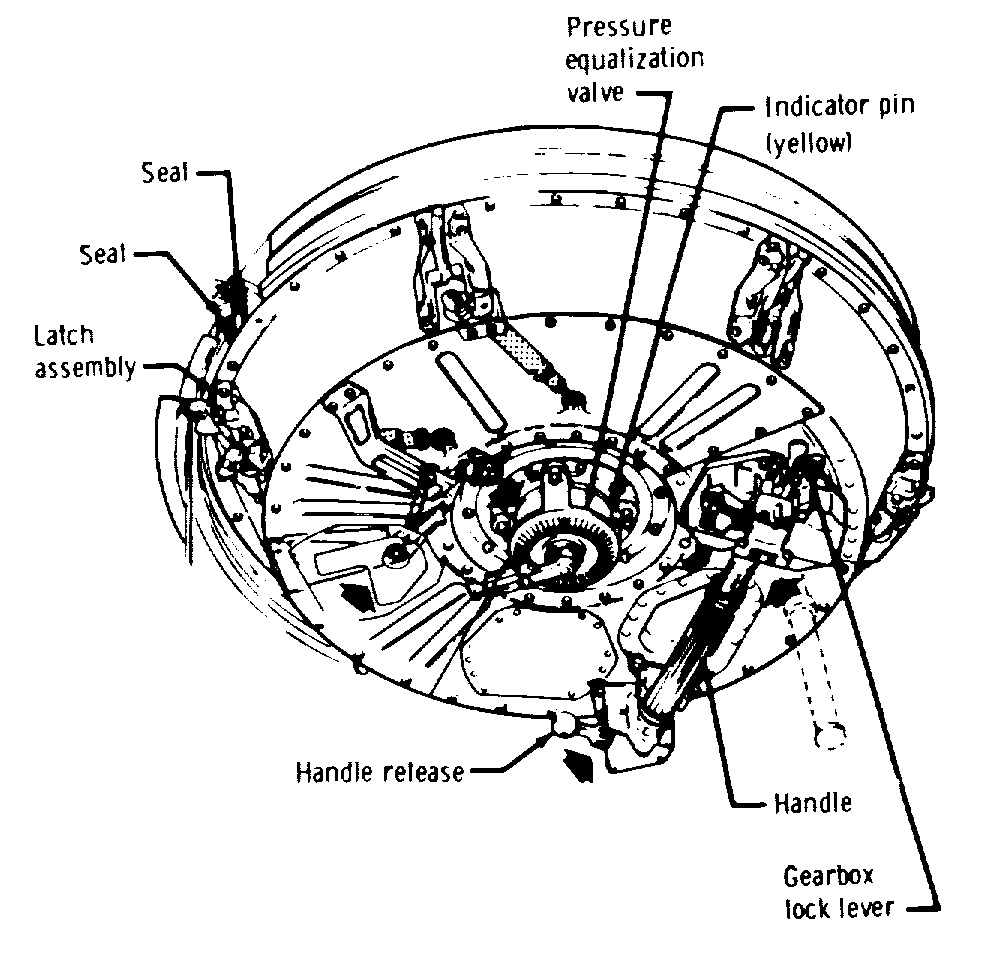 מכסה הפתח של תעלת העגינה בחללית אפולו